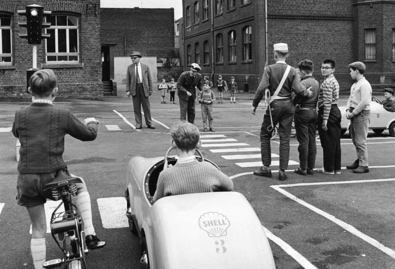 Verkehrserziehung der Schuljugend an Hand praktischer Beispiele durch die Polizei